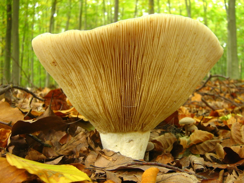 Lactarius vellereus